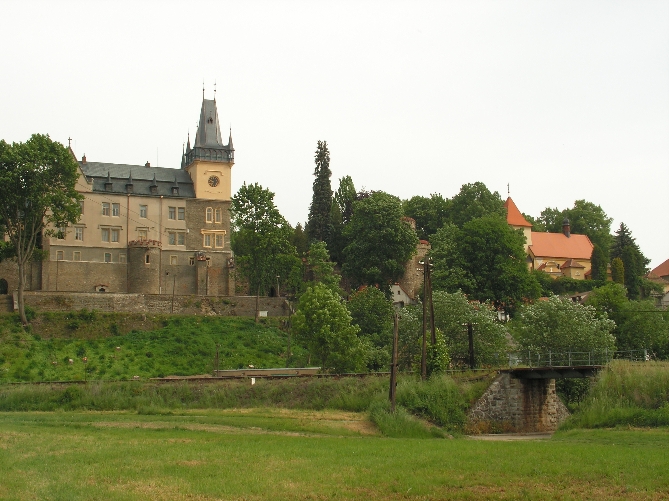 Město Zruč nad Sázavou ve Středočeském kraji.